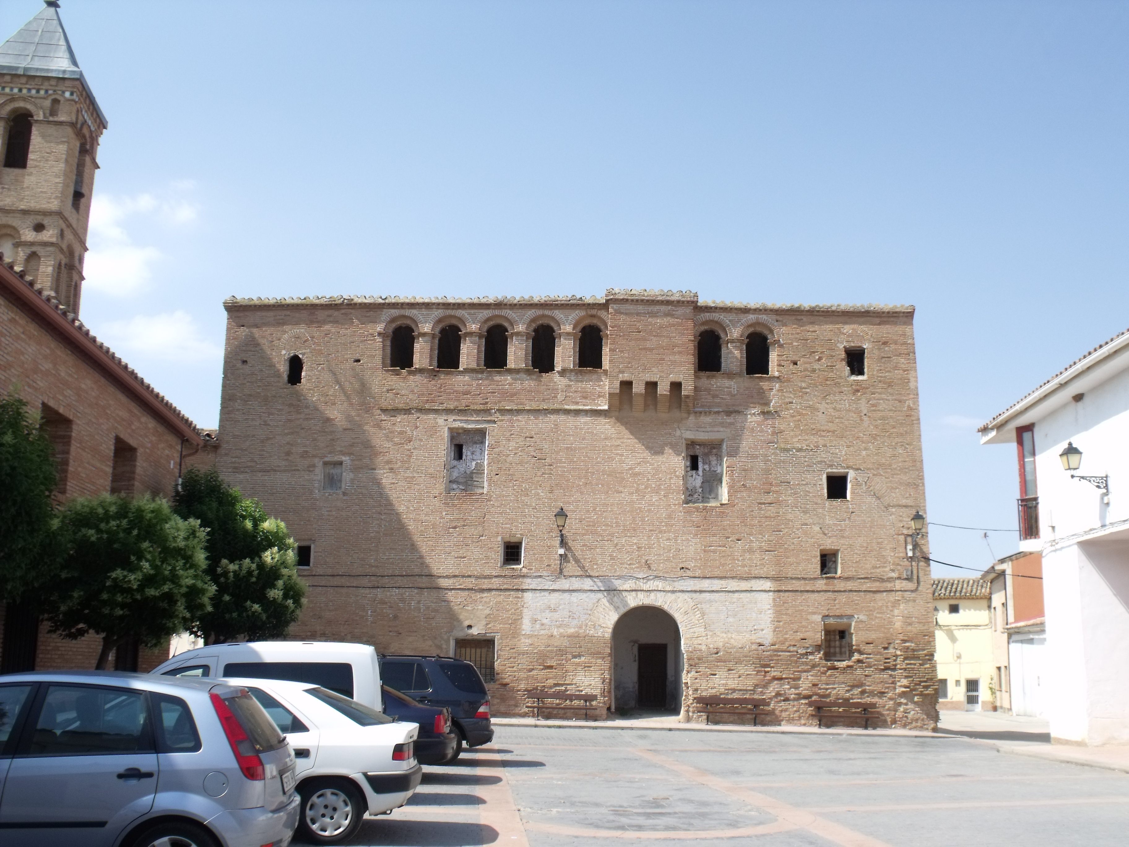 Fachada principal de la casa fortificada de Mozota